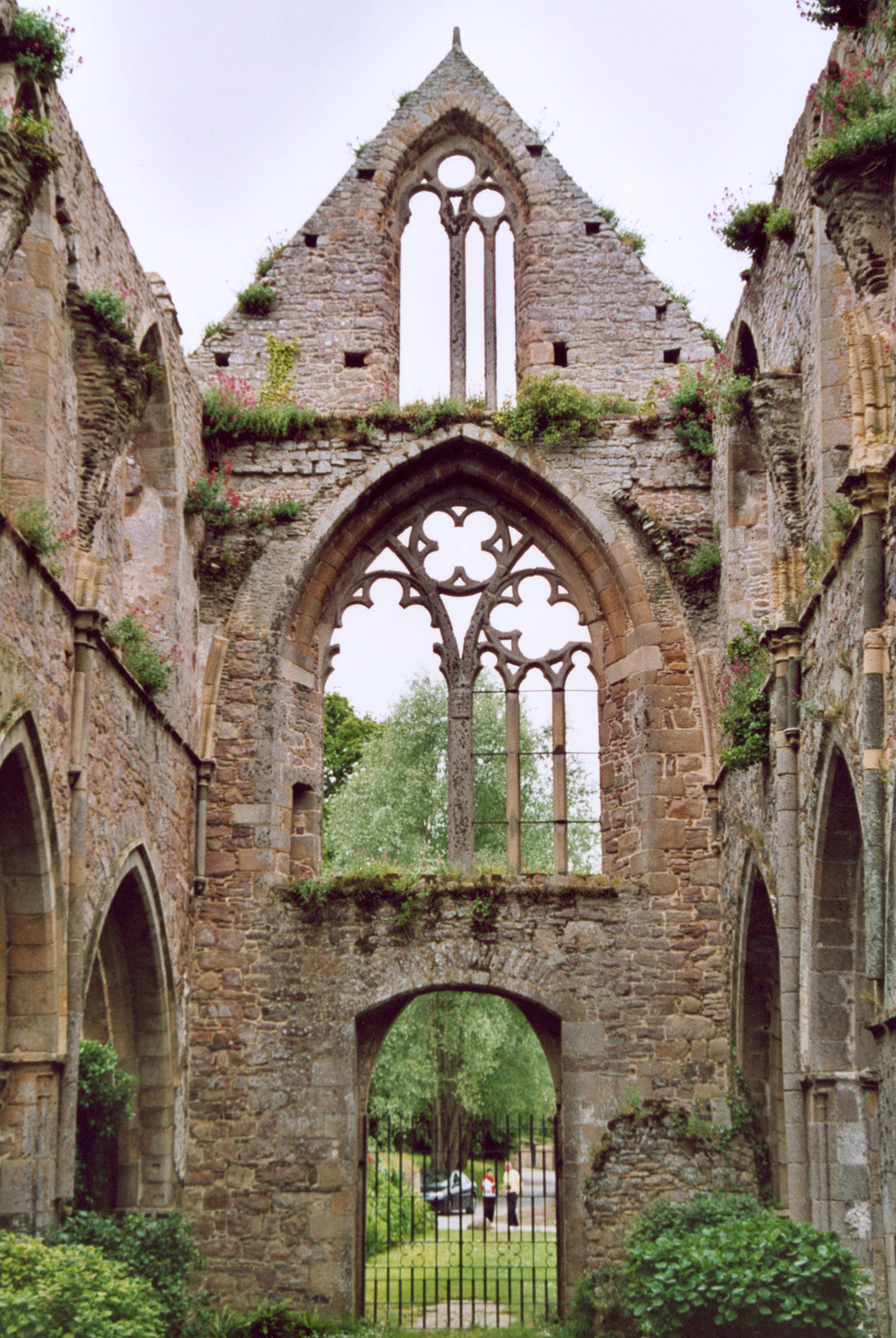 Bretagne Kérity Abbaye de Beauport Auteur : GIRAUD Patrick